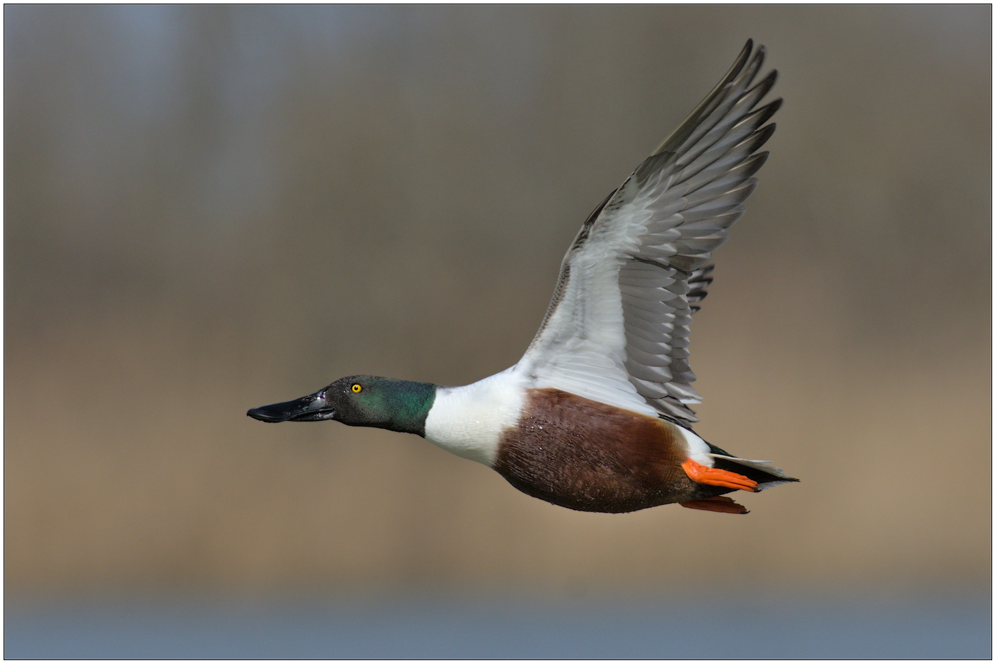 Mestolone comune maschio in volo.